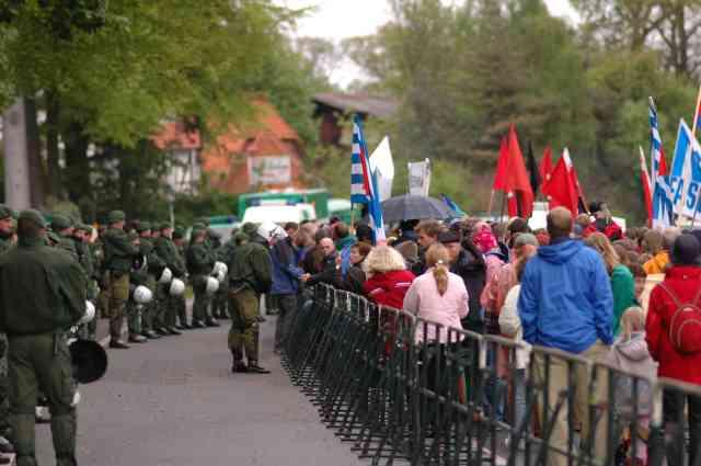 Demonstration vor dem Heisenhof in Dörverden-Barme